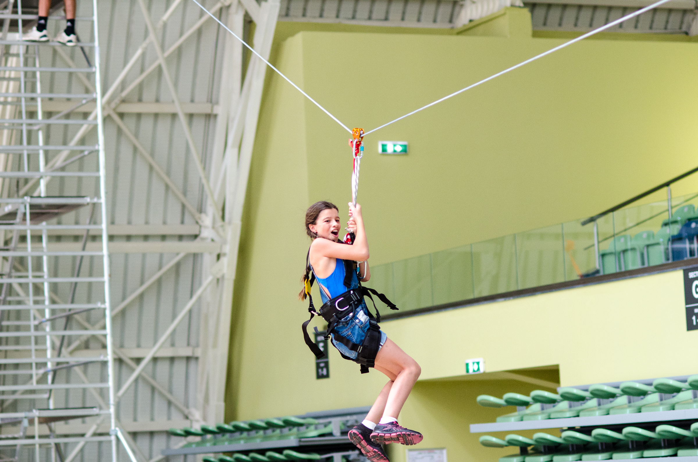 Адреналинни игри в Комплекс С.И.²Л.А.